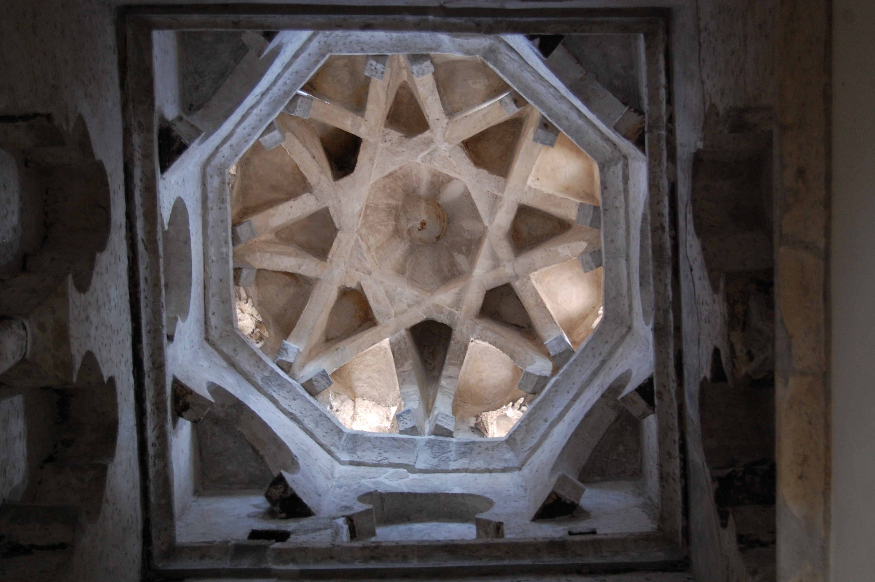 Antigua mezquita de Bab al Mardum. Iglesia del Cristo de la Luz, Toledo (España). Arte omeya de al-Andalus, año 999.